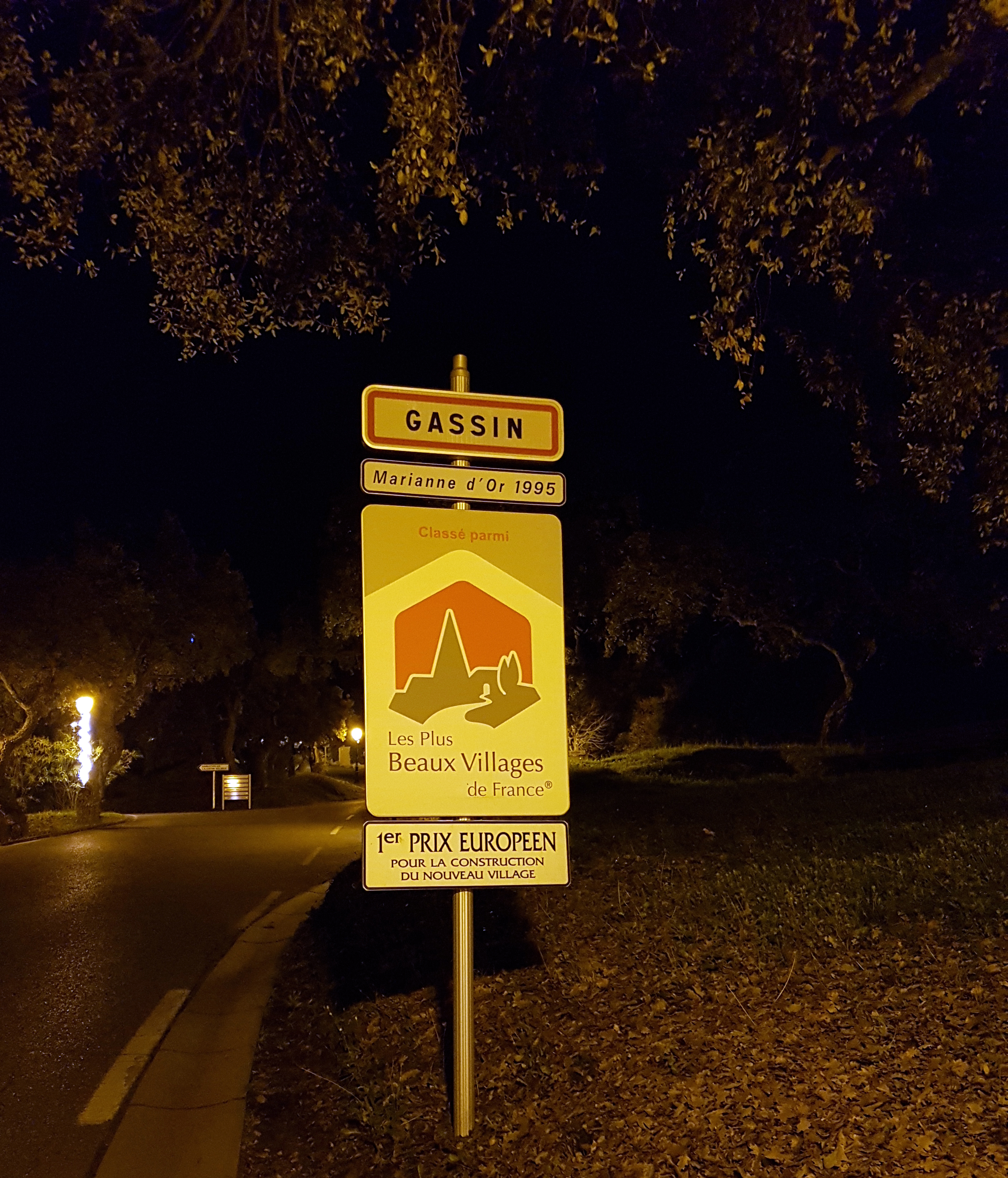 Panneau d'entrée de village à Gassin, Marianne d'Or, Plus Beaux villages de France